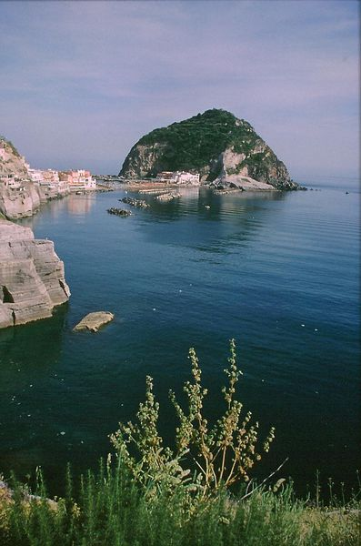 Promontorio di S. Angelo